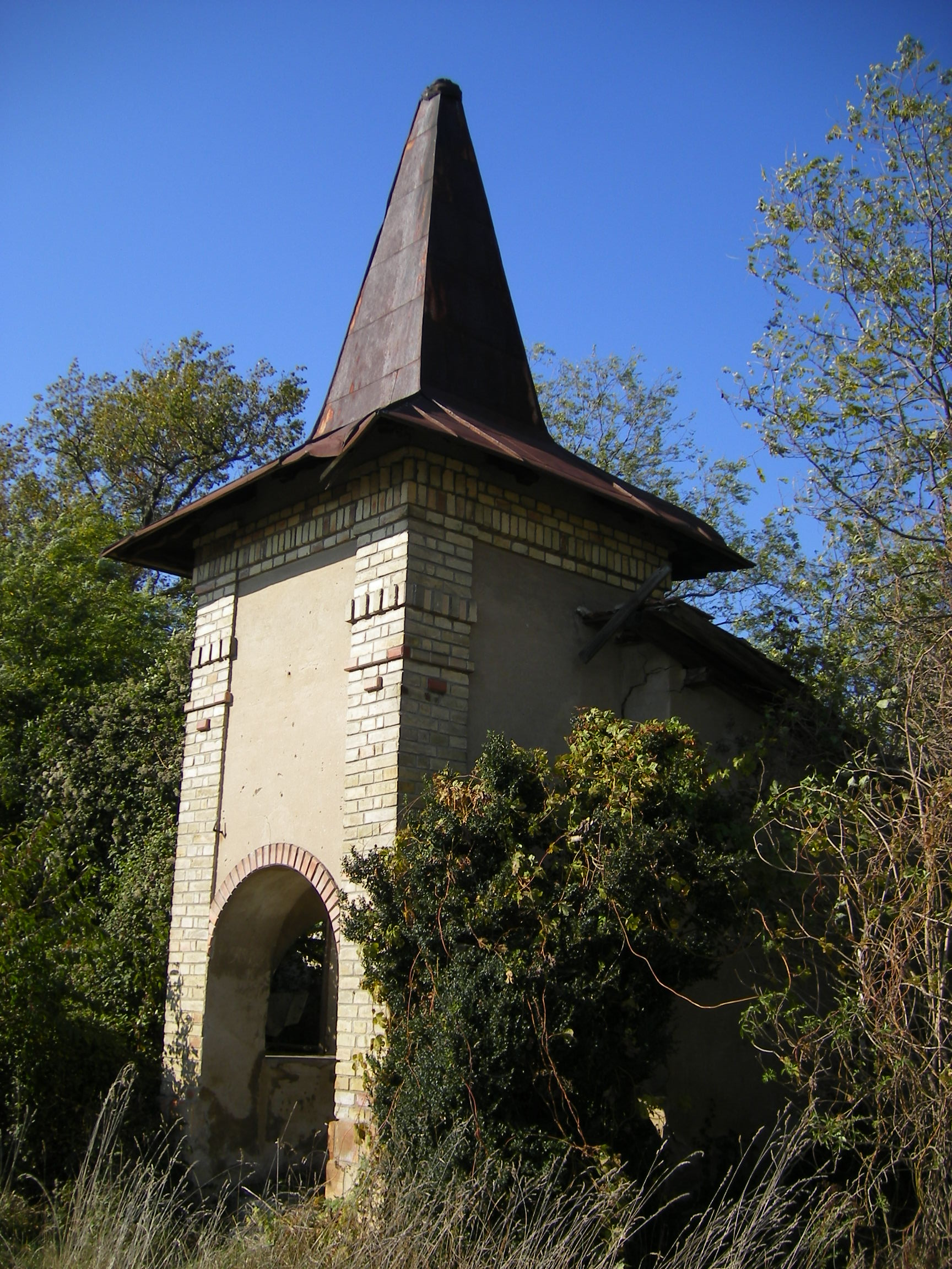 Vágfüzes, Feszty-vadászház